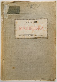 Обложка 1 издания книги В. Набокова "Машенька", 1926